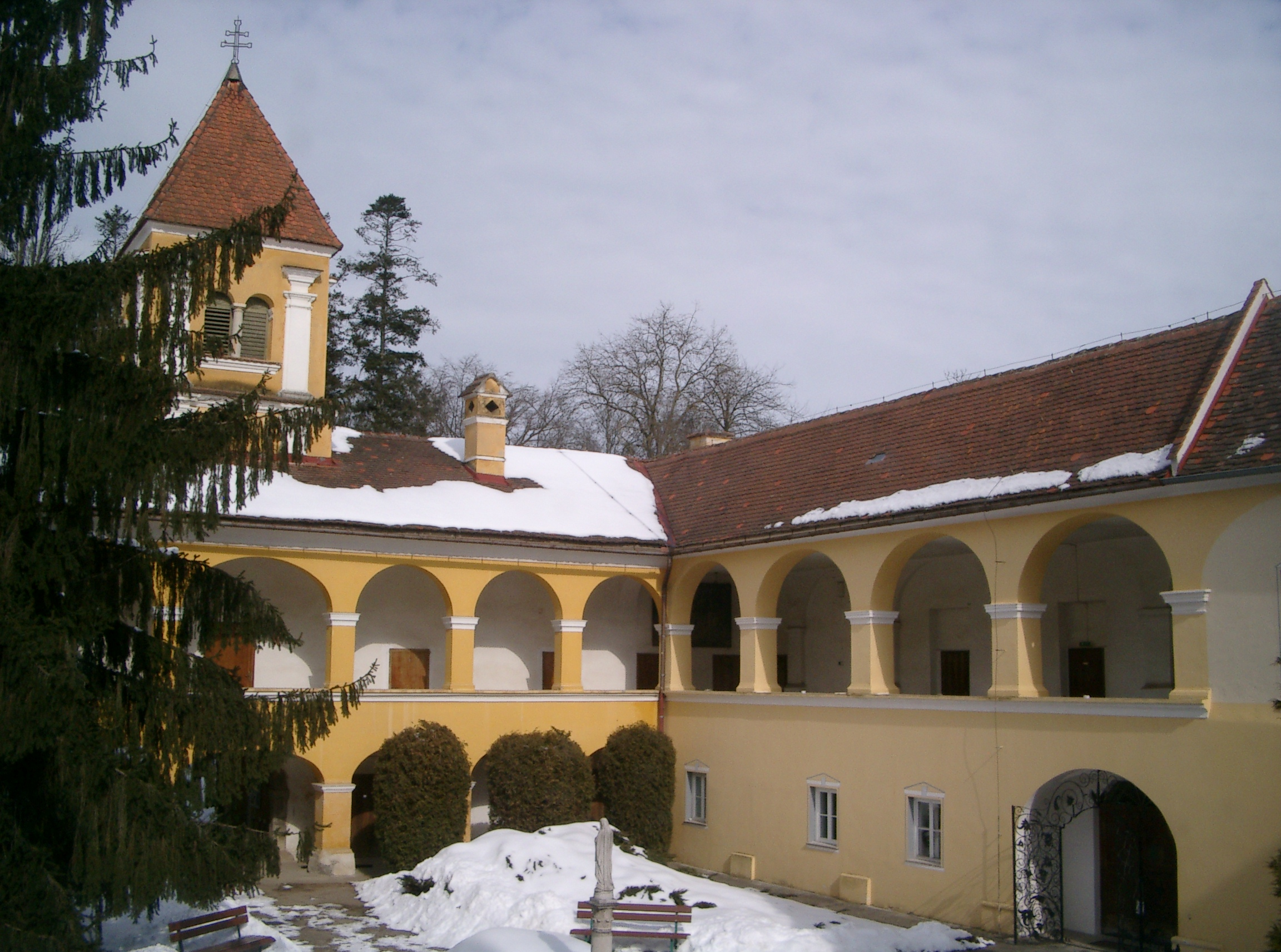 Schloss Johnsdorf-Brunn